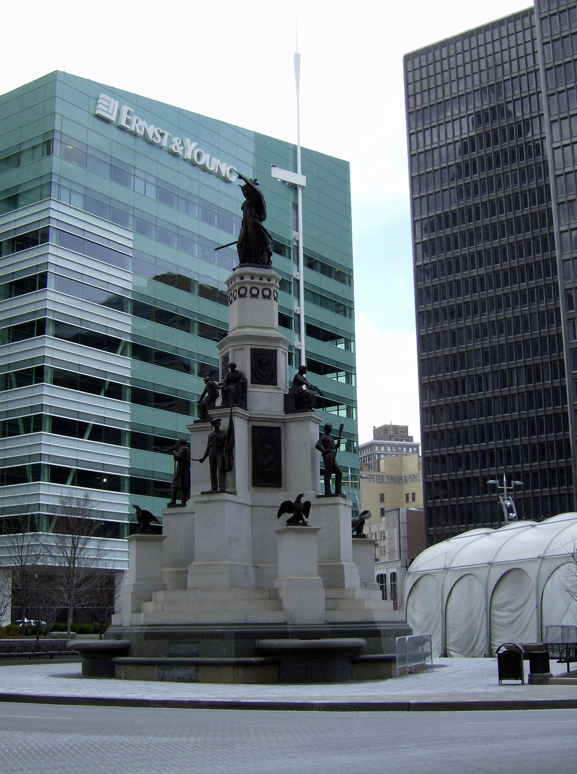 CampusMartiusDetroit